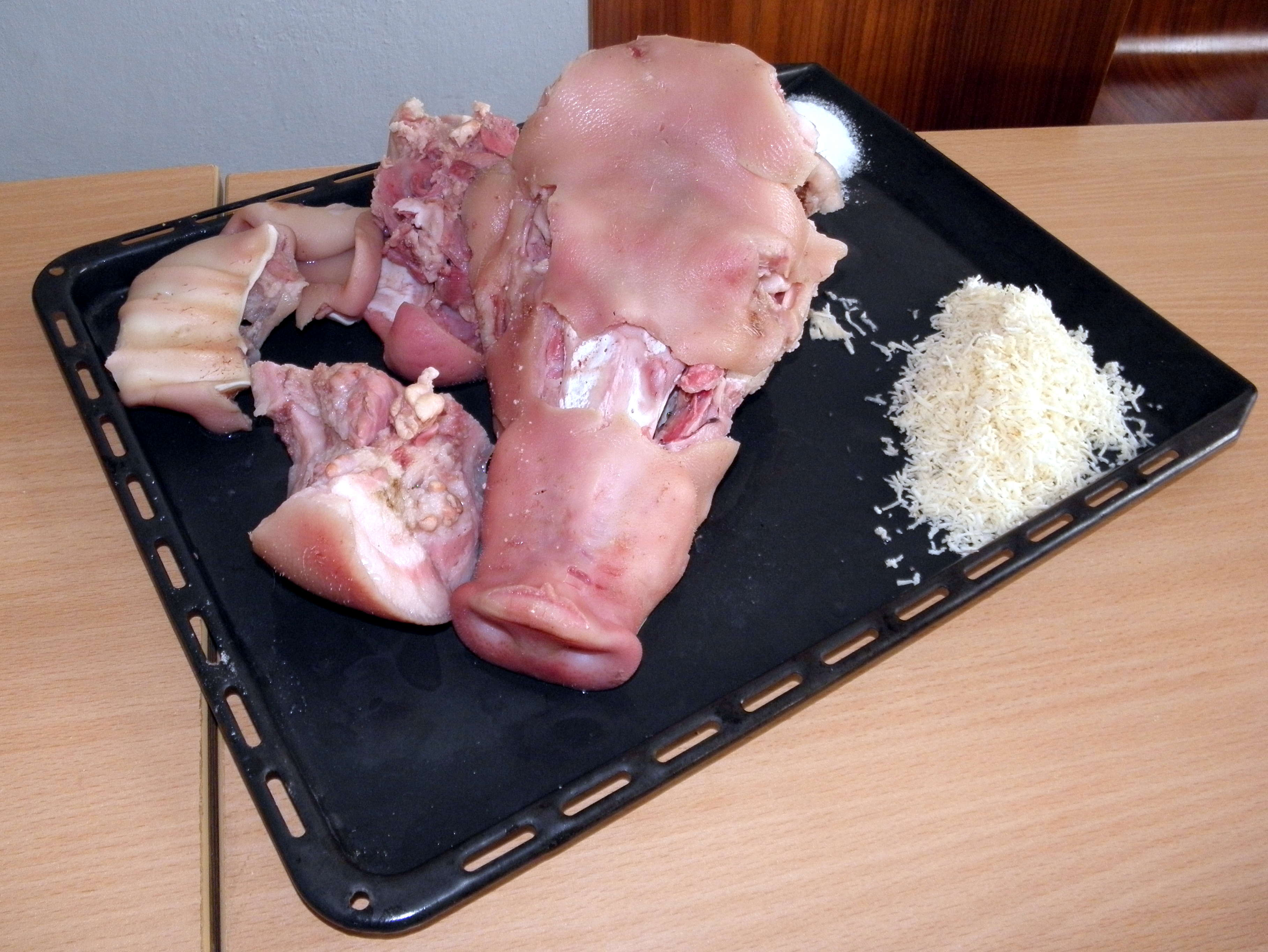 Ovar z prasete cca 50 kg